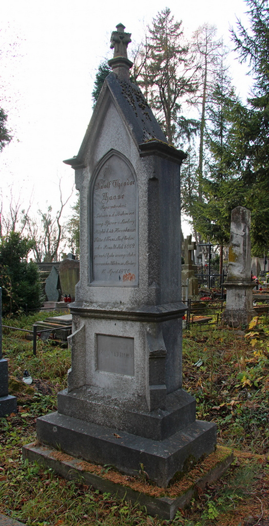 Надгробок на могилі А. Т.Хаазе.Личаківський цвинтар , поле № 56.